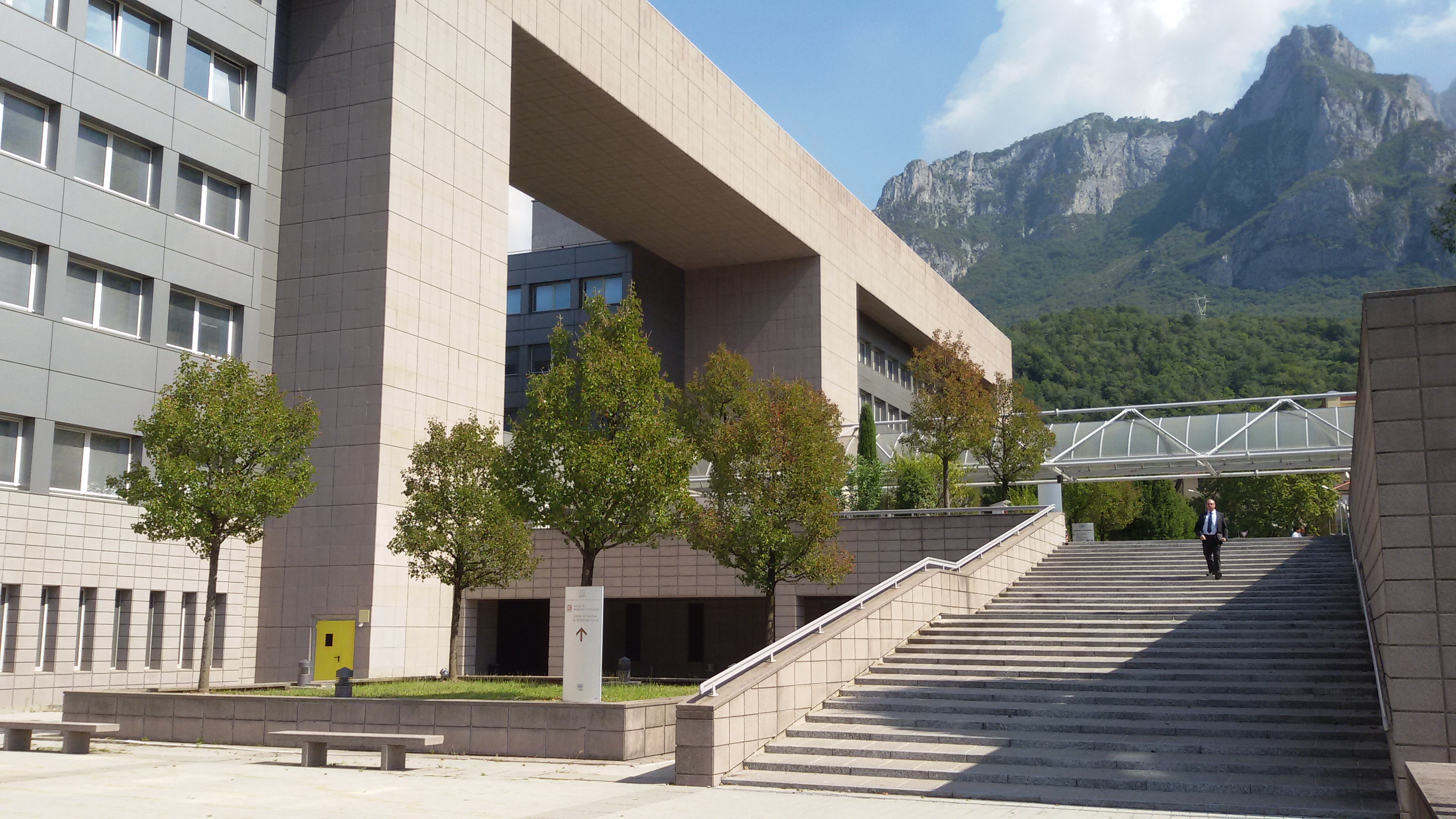 Ingresso dell' Ospedale Manzoni di Lecco